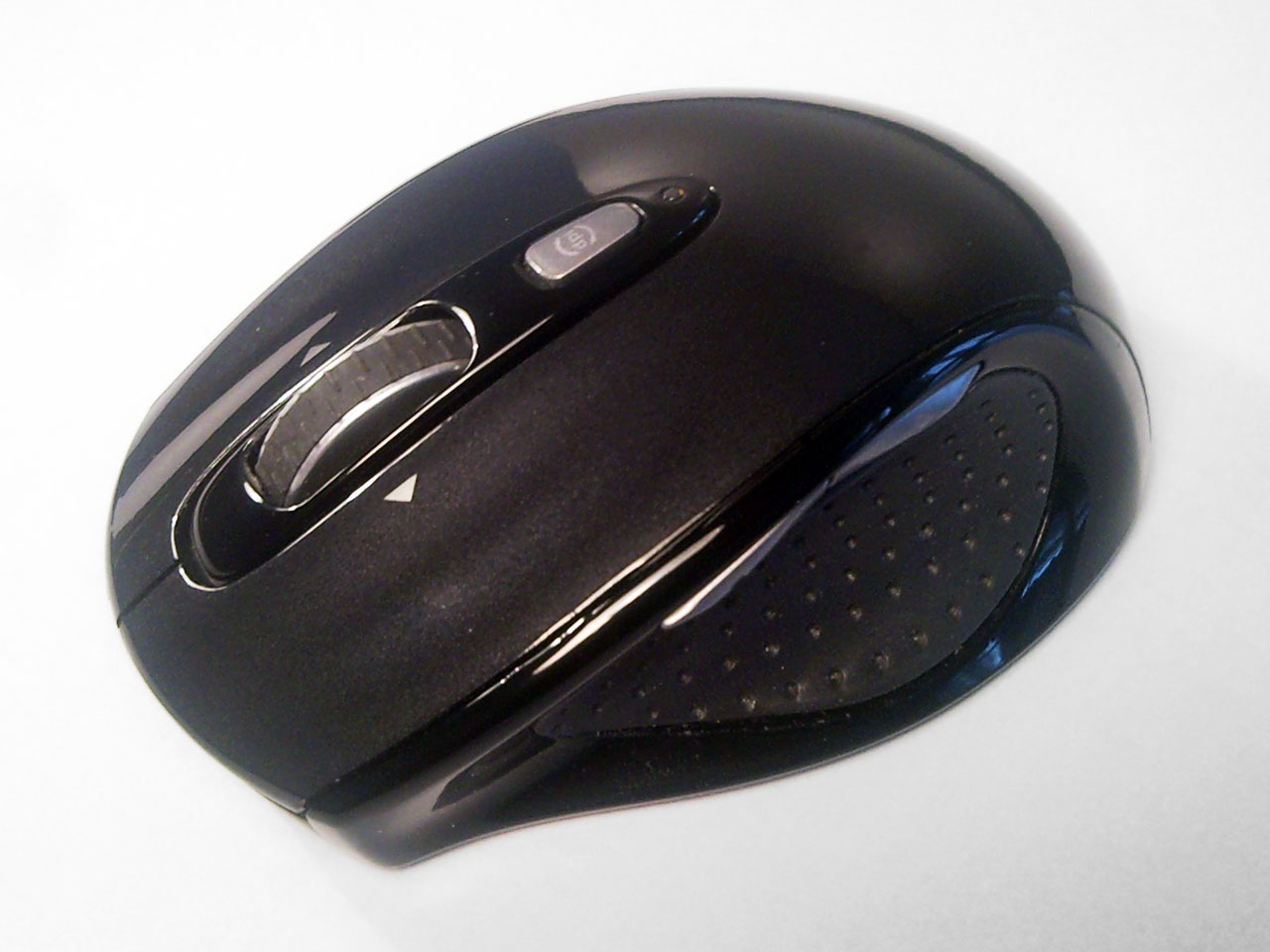 Sodobna brezžična laserska računalniška miška